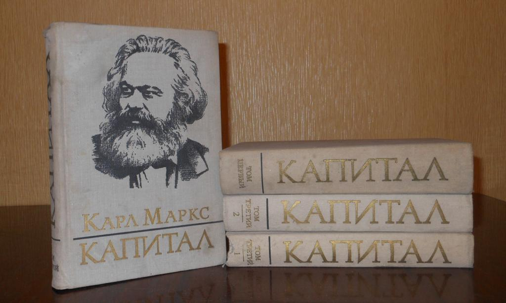 Капитал (Маркс)